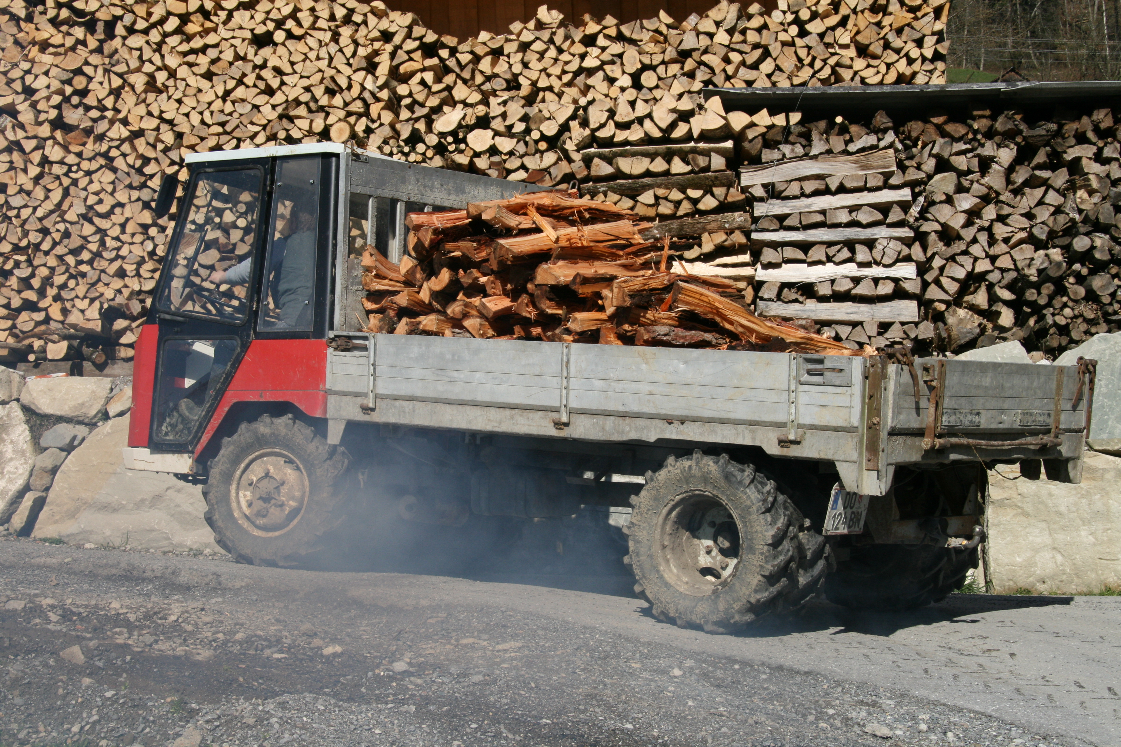 Lindner ist ein Landmaschinenhersteller aus Österreich mit Sitz in Kundl in Tirol.